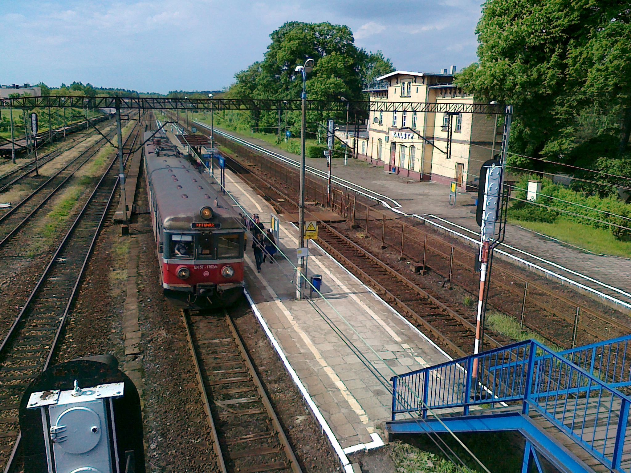 Kalety - stacja widok z kładki na północ